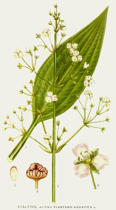 Alisma plantago-aquatica L. Original Description Svalting, Alisma plantago-aquatica L.